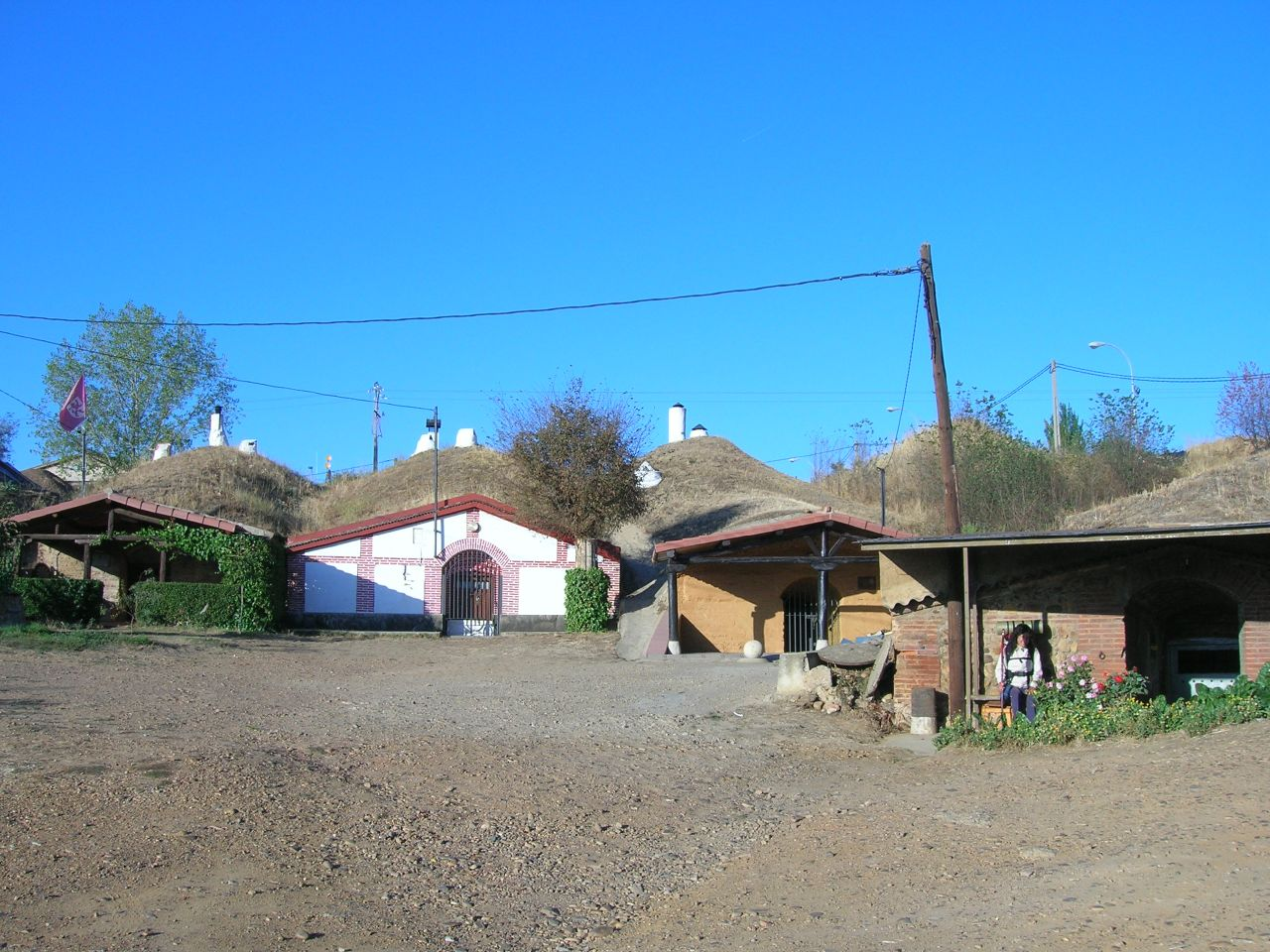 Bodegas semienterradas en Trobajo del Camino Vuela hasta esta localización (Necesitas Google Earth)